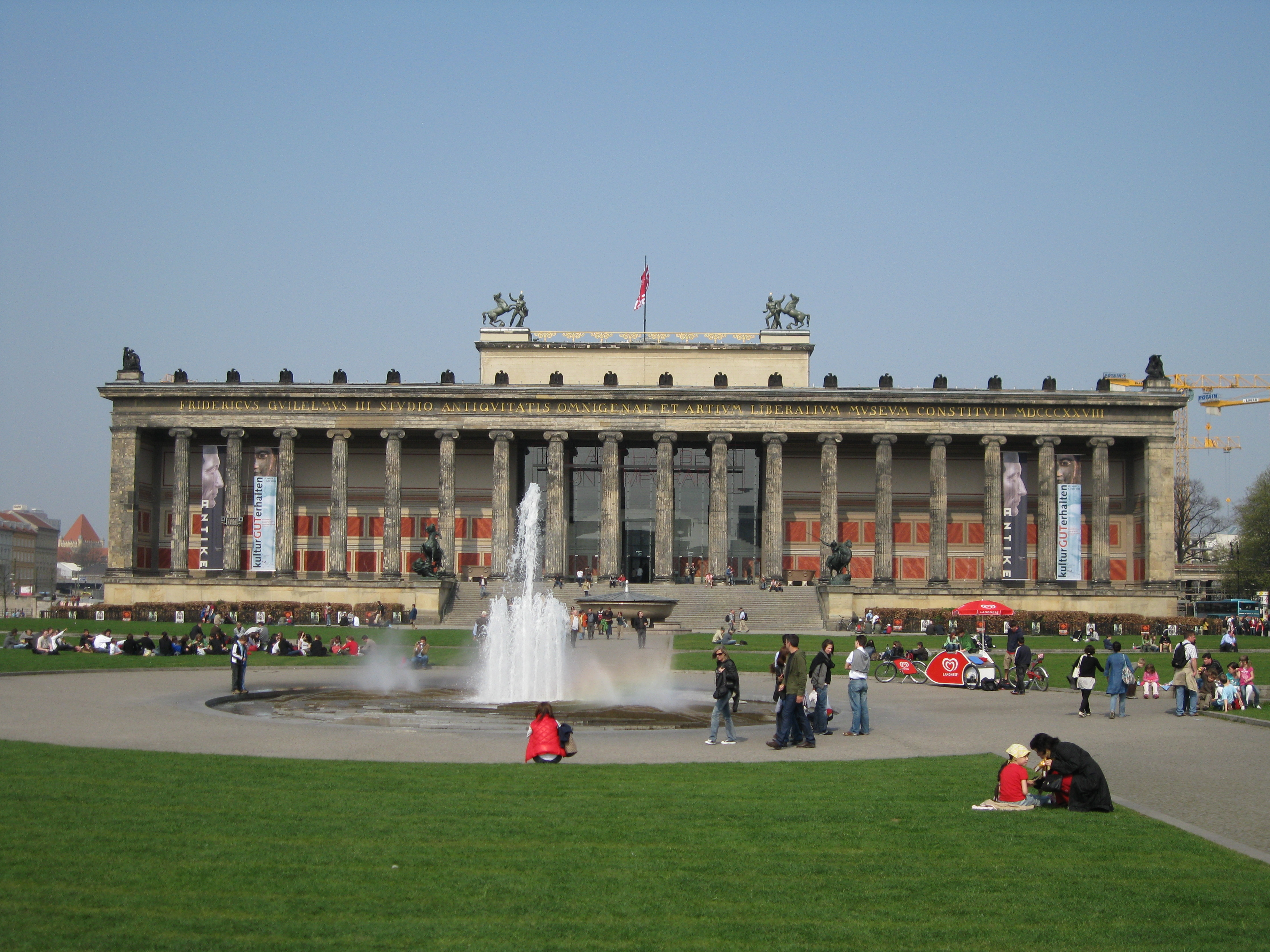 Altes Museum Berlin